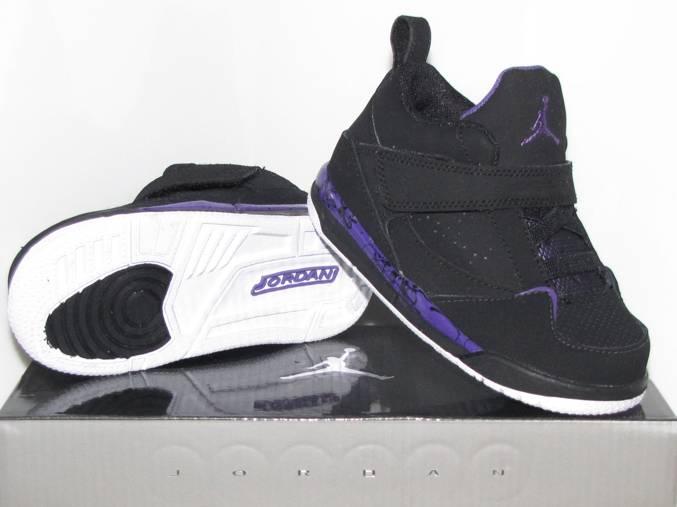 Baby Jordan de pointure 25 (Europe)